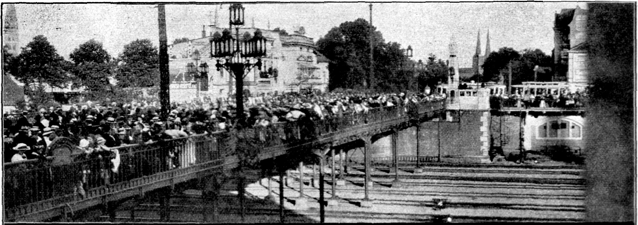 Menschenmeng bejubelt abrückendes Regiment Lübeck auf der Fackenburger Alleebrücke